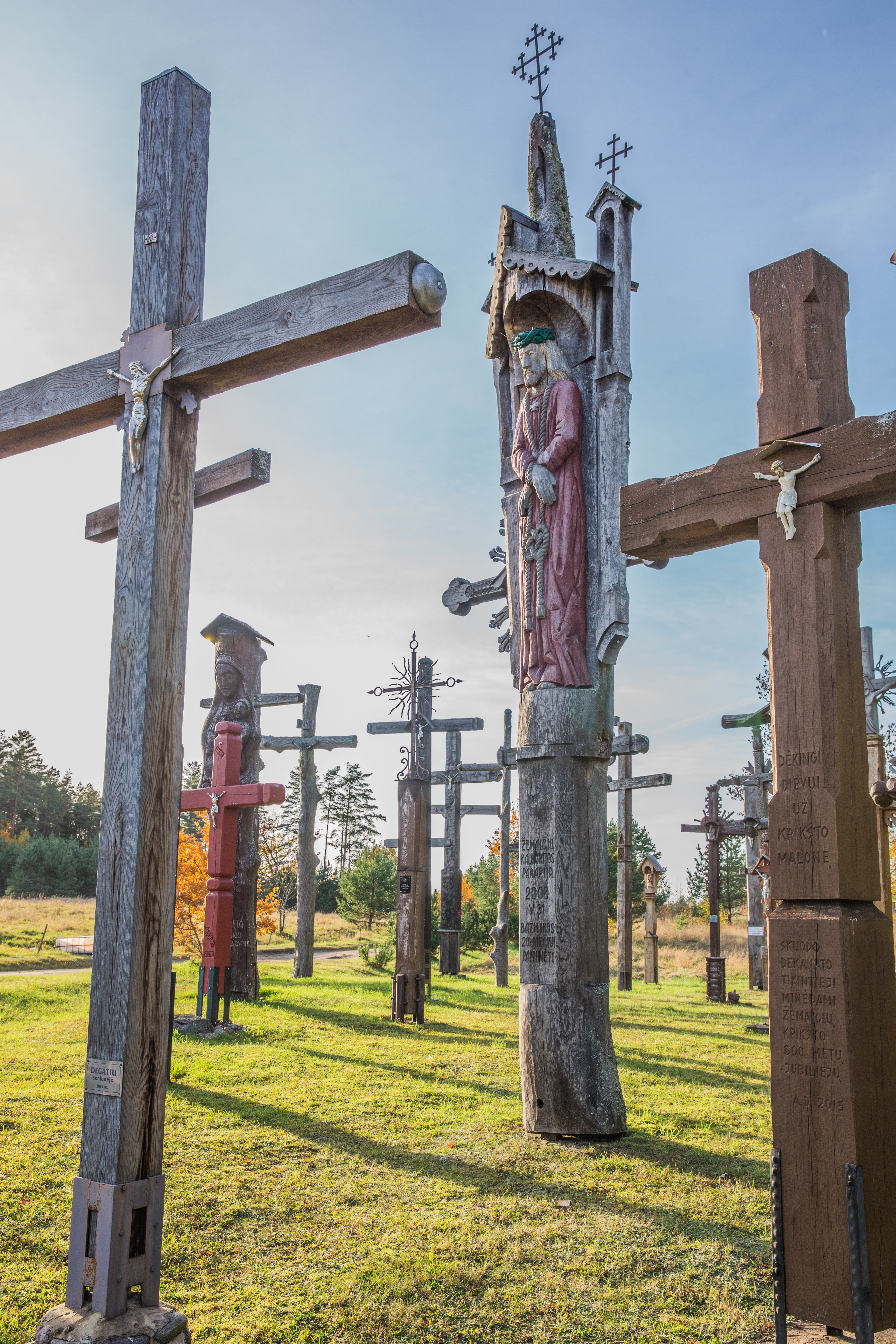 Kryžius Kęstaičių kankinių vietoje